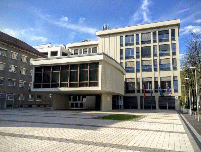 Zgradba IZUM